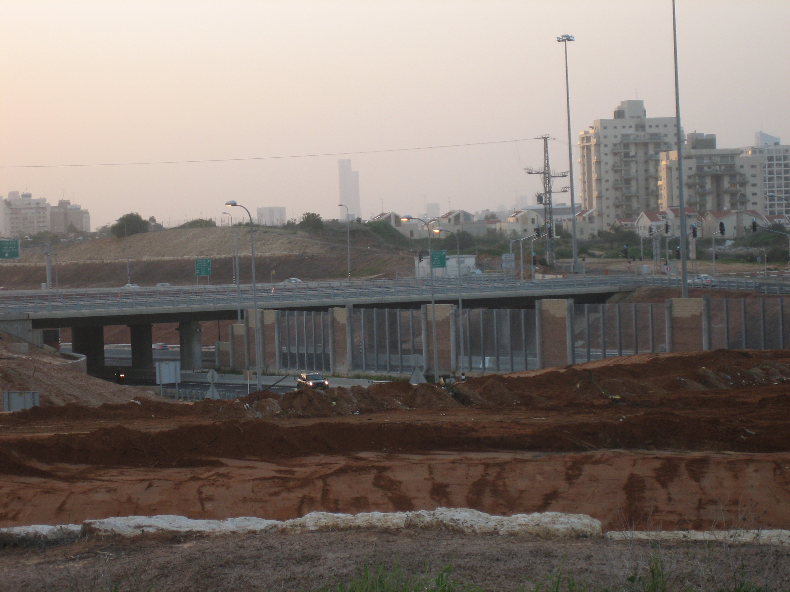 גשר אונו